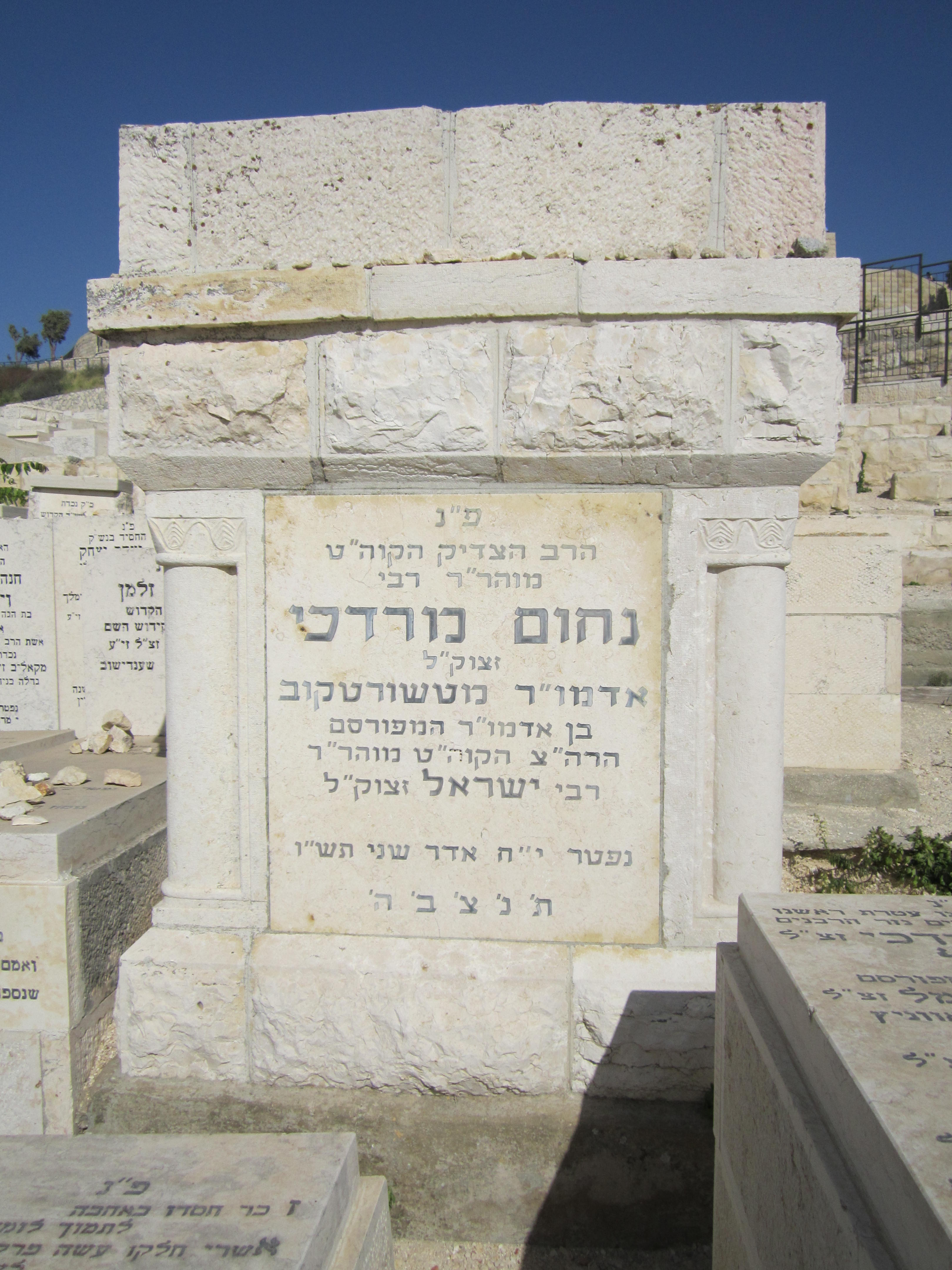 קברו של רבי נחום מרדכי פרידמן מצ'ורטקוב בהר הזיתים